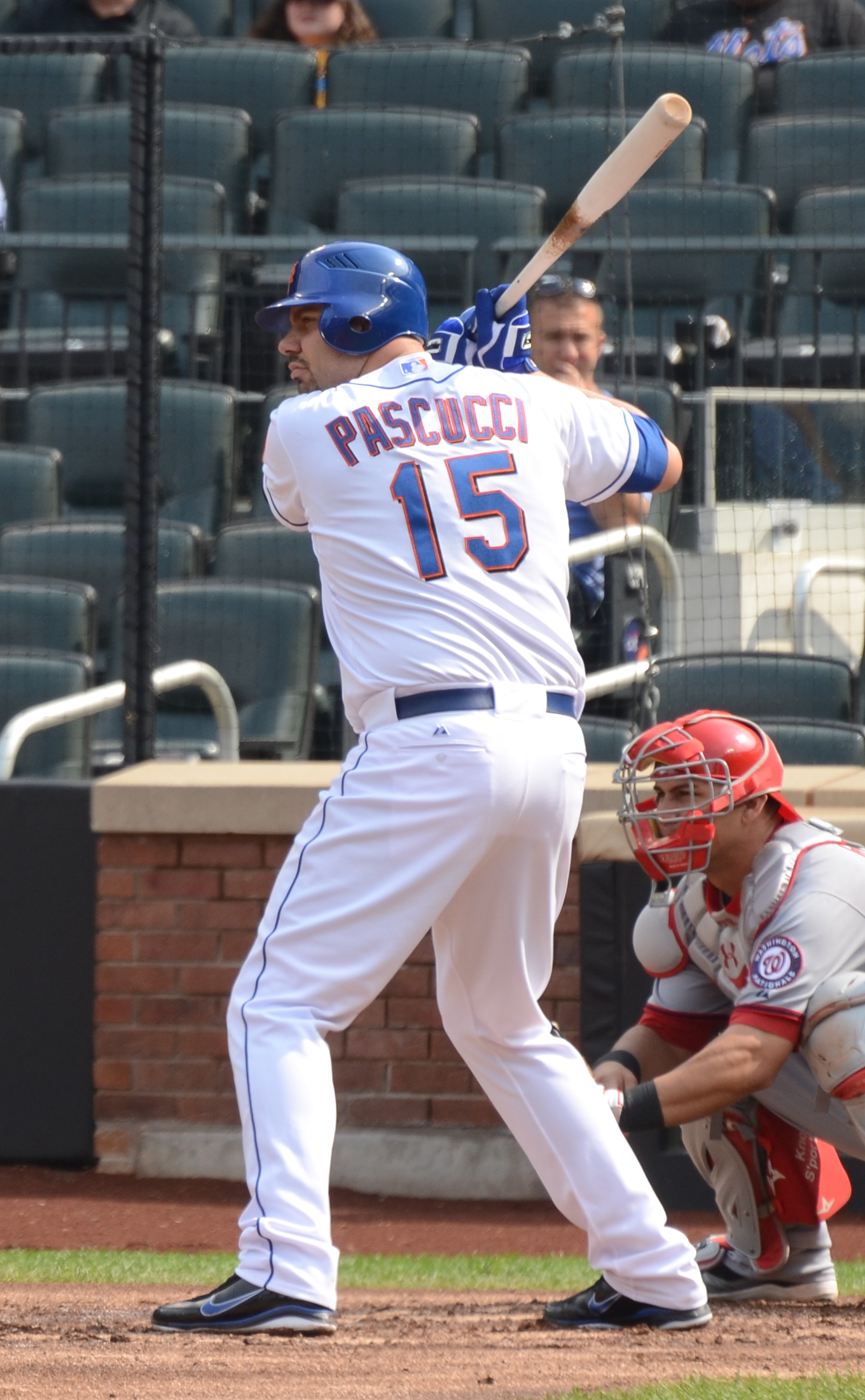 Valentino Pascucci